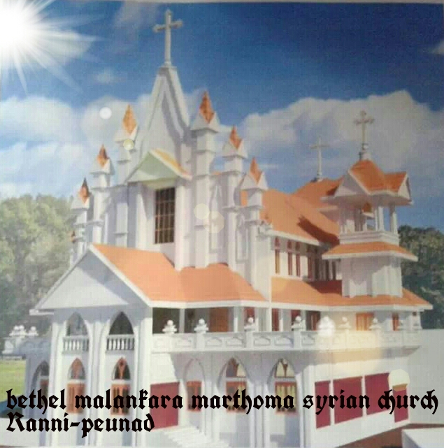 Bethel malankara marthoma syrian church , Ranni-perunad, pathanamthitta, kerala, india